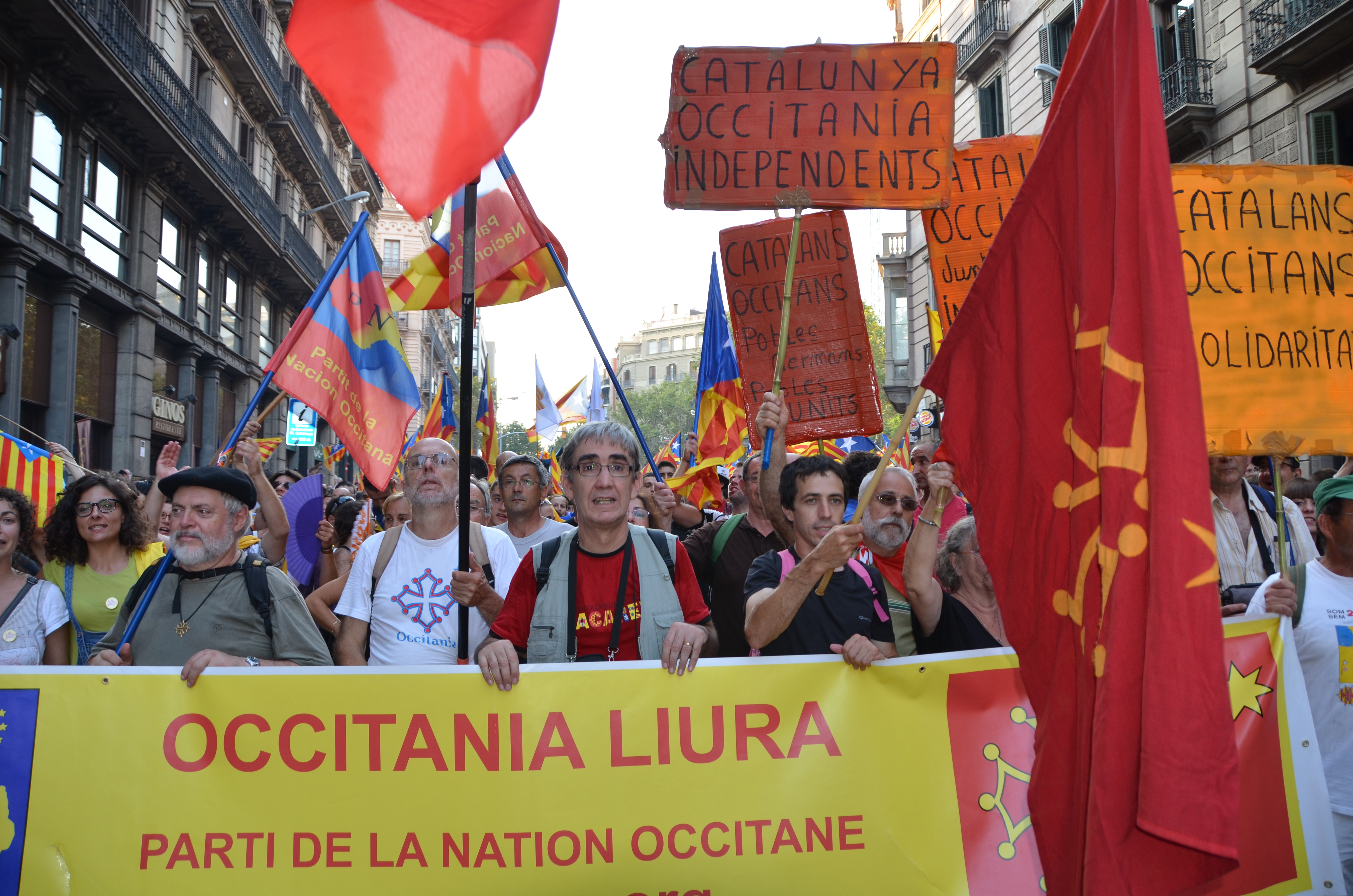 11s2012 Partit de la Nacion Occitana